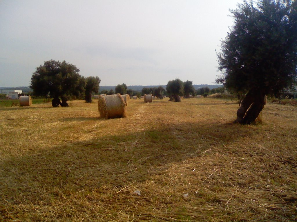 Autore:Giovanni Brescia Paesaggio della campagna monopolitana La rilascio nel pubblico dominio